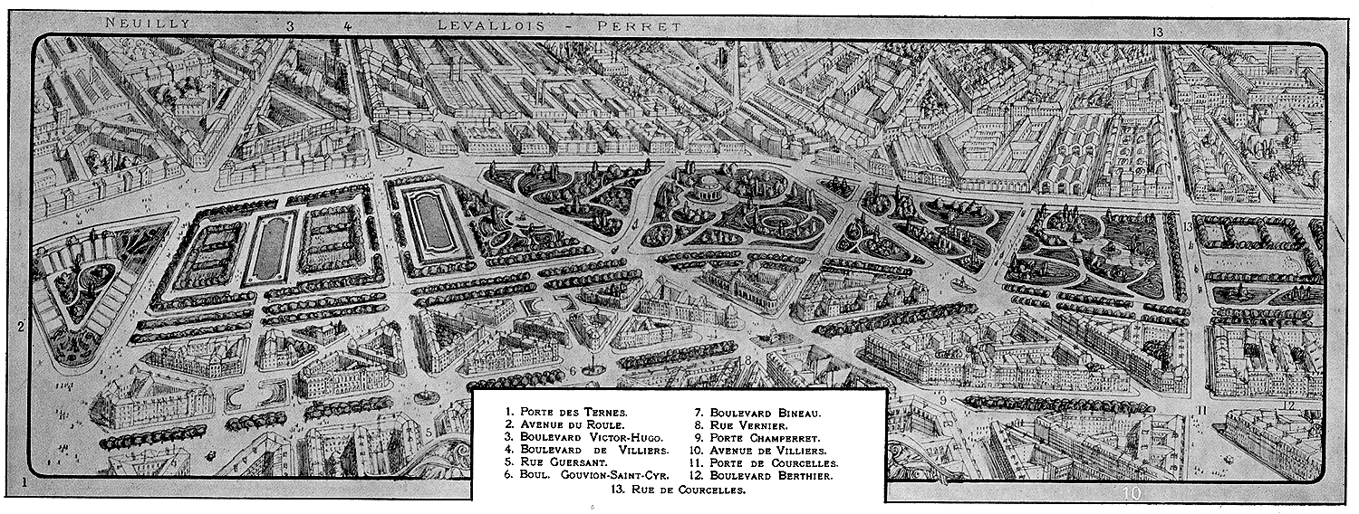 projet d'amenagement des fortifications en parcs et jardin Ouest de Paris entre porte des Ternes et Courcelles L'Illustration, No. 3646, 11 Janvier 1913